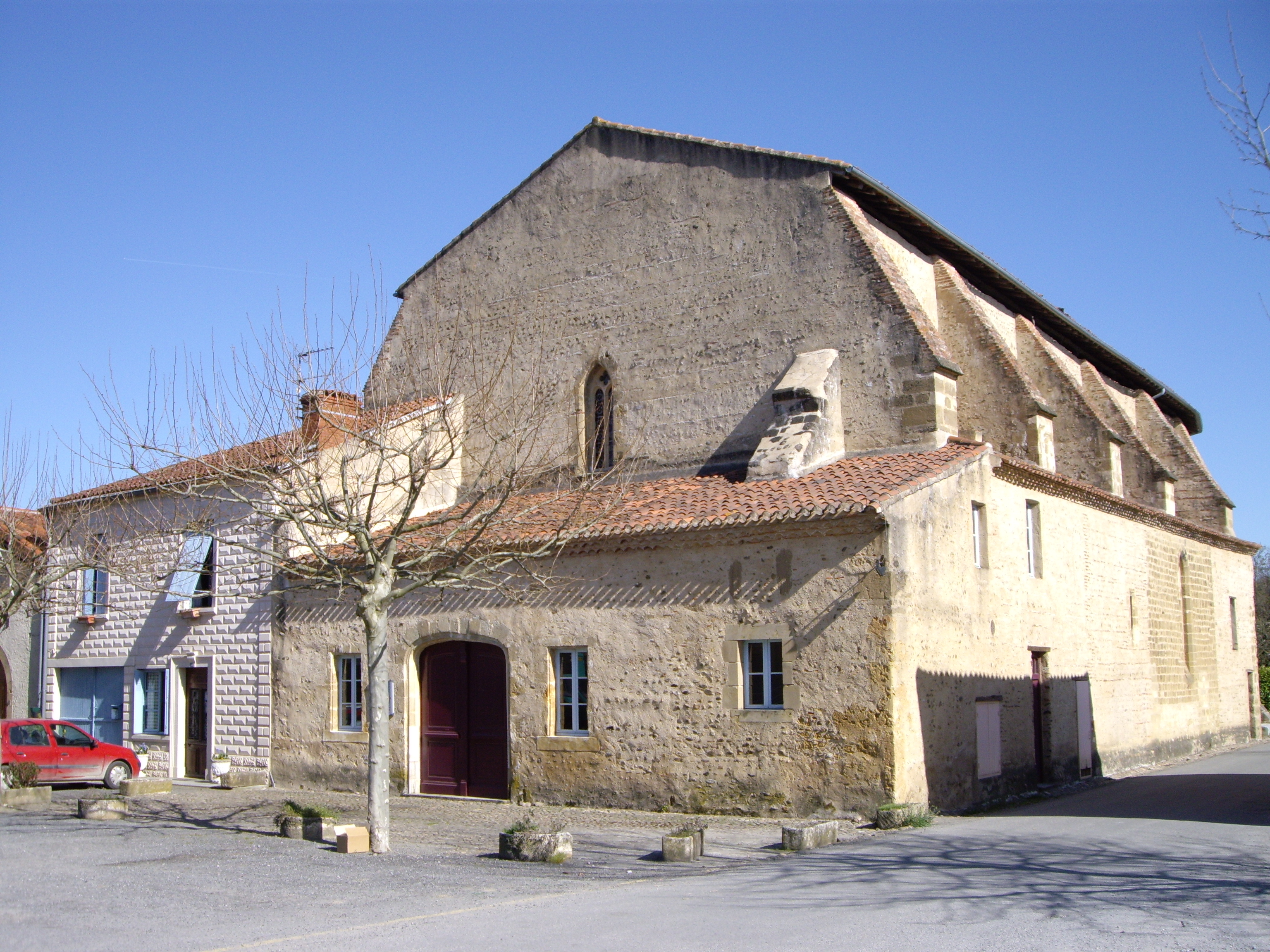 Monastère des Carmes de Trie-sur-Baïse (Hautes-Pyrénées, France)